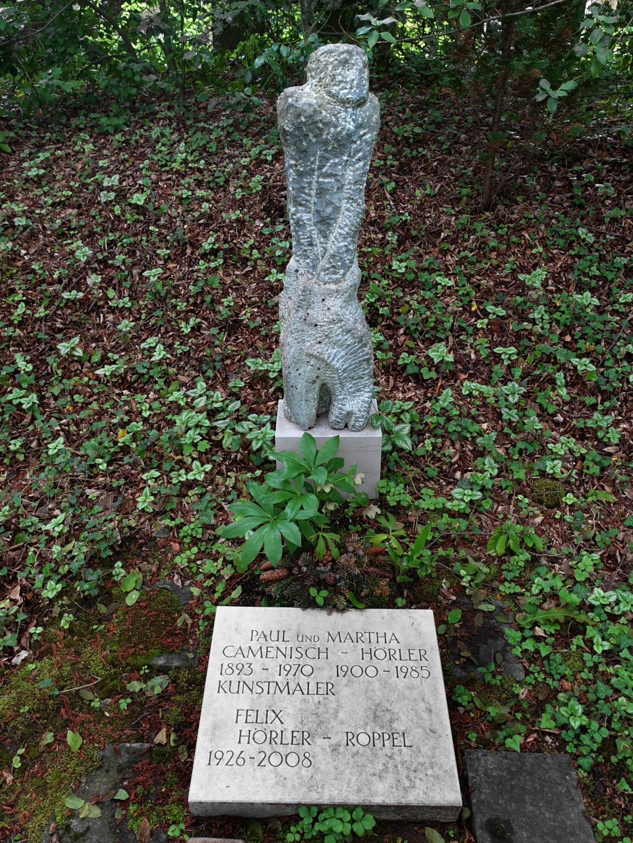 Paul Camenisch-Hörler (1893–1970) Architekt, Zeichner Maler. Mitbegründer der Künstlergruppe Rot-Blau, sowie der Basler Gruppe 33. Grab auf dem Friedhof am Hörnli, Basel